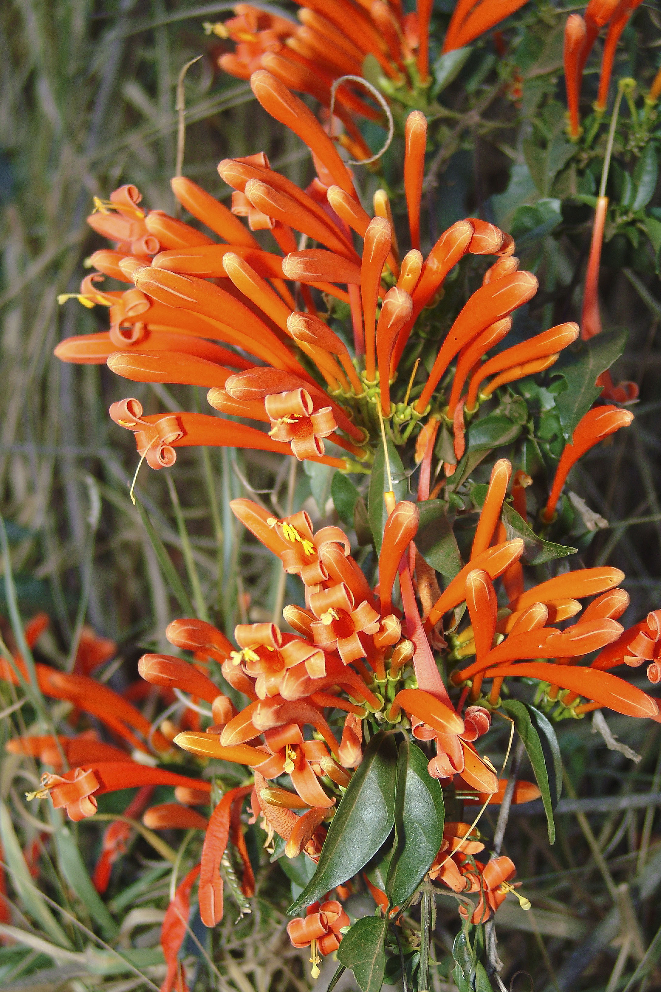 flor de São João, (Pyrostegia venusta) ou: cipó-de-são-joão, cipó-bela-flor, marquesa-de-belas, cipó-pé-de-lagartixa, cipó-de-lagarto - florece mais ou menos de maio e vai até setembro